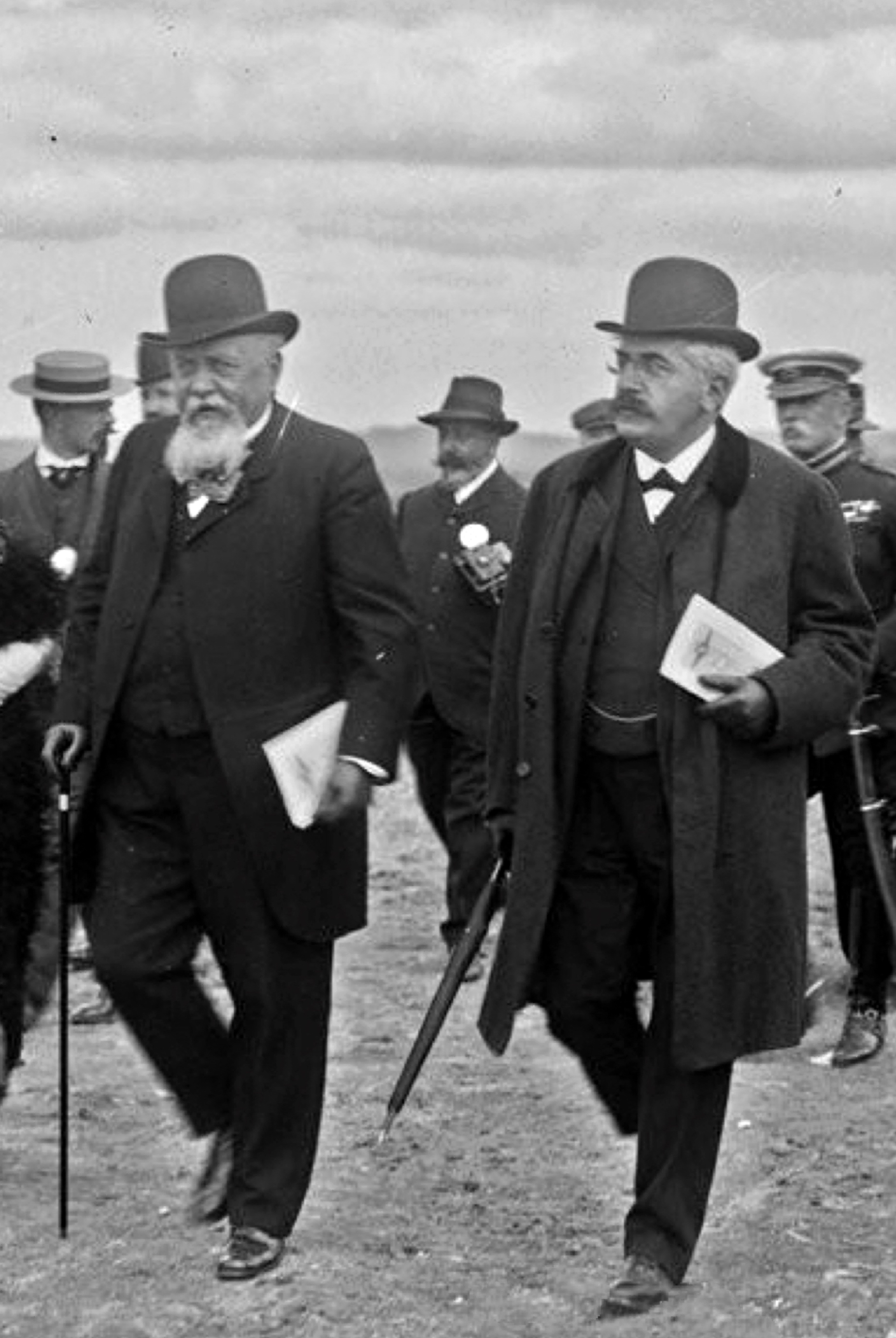 Armand Fallières, président de la République française, Alexandre Millerand le ministre des Travaux publics, des Postes et Télégraphes, en visite à Reims.